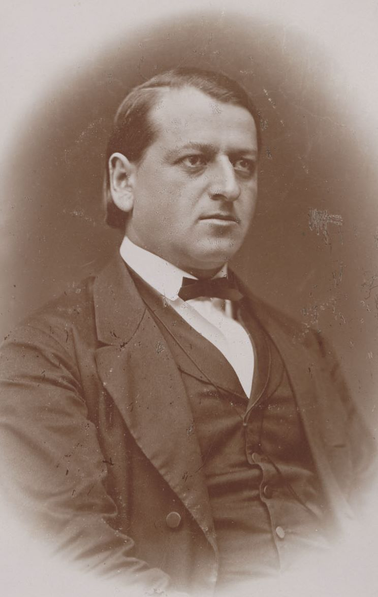 Prof. Paul von Buder (1836-1914)